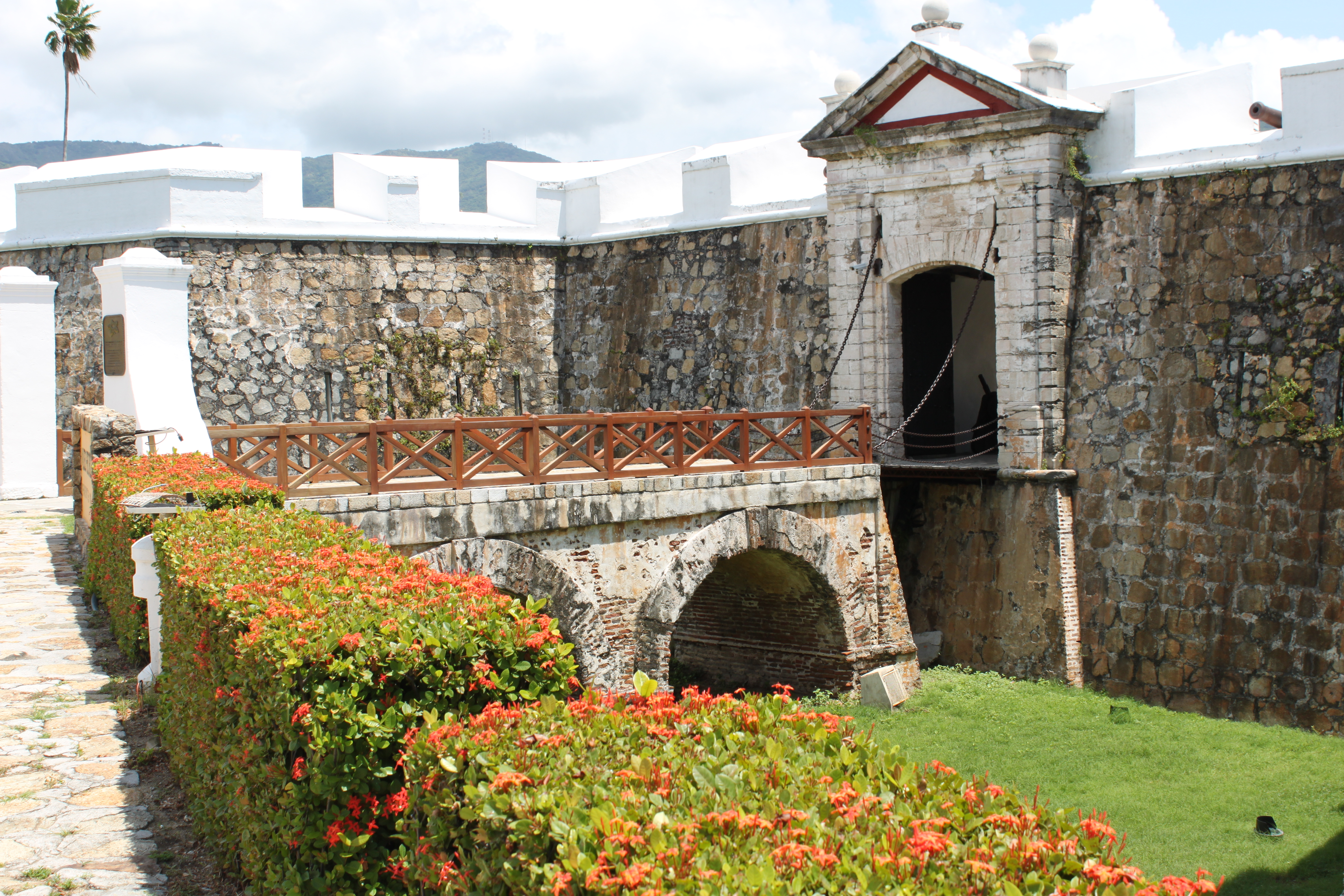 El fuerte de San Diego, hoy convertido en museo, es testigo fiel de la historia del hermoso puerto de Acapulco.